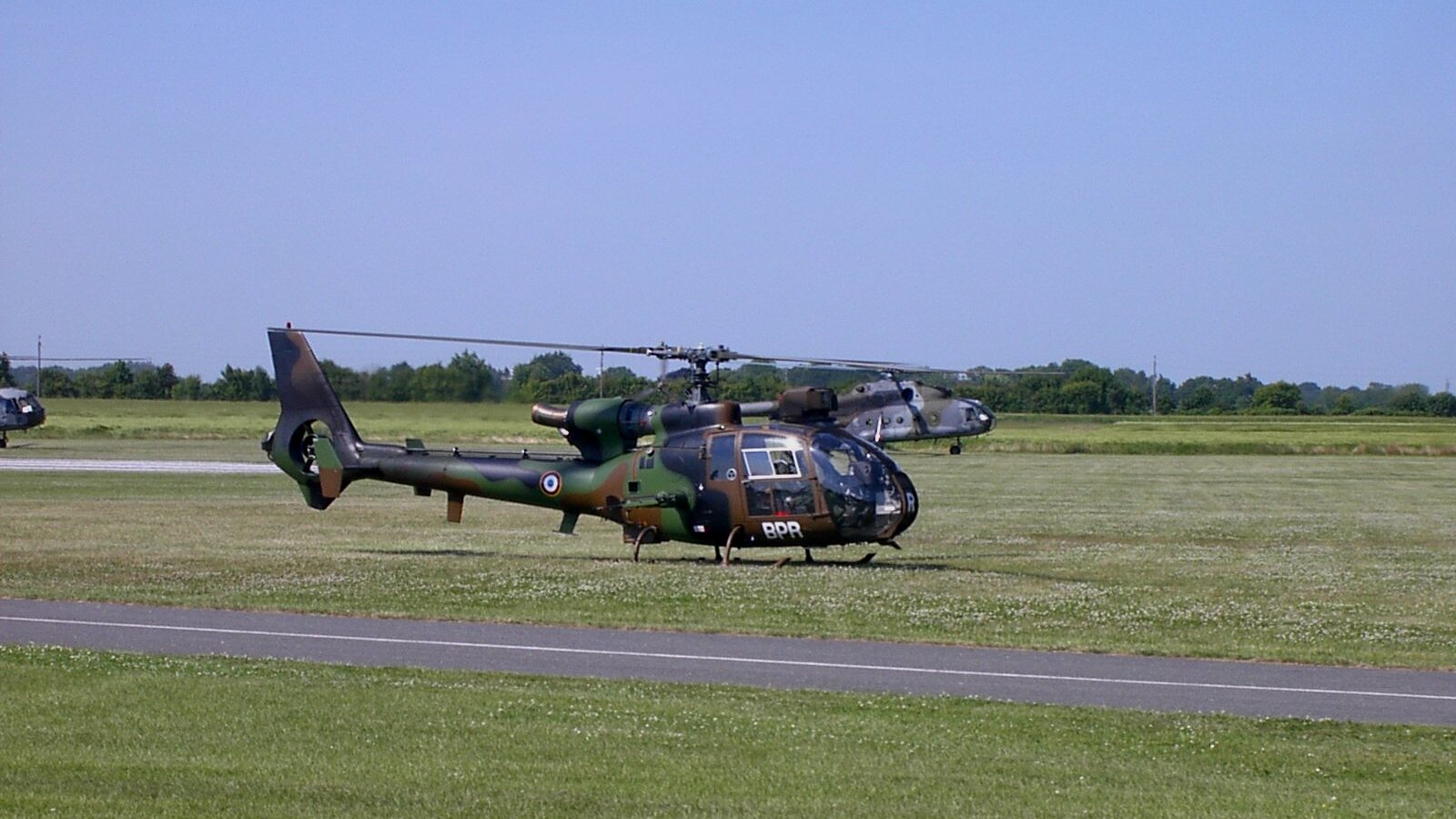 Gazelle Helikopter fra det Franske Luftvåben og en Hip Helikopter fra det Polske Luftvåben på Lolland Airport under Danex 2005 øvelsen.